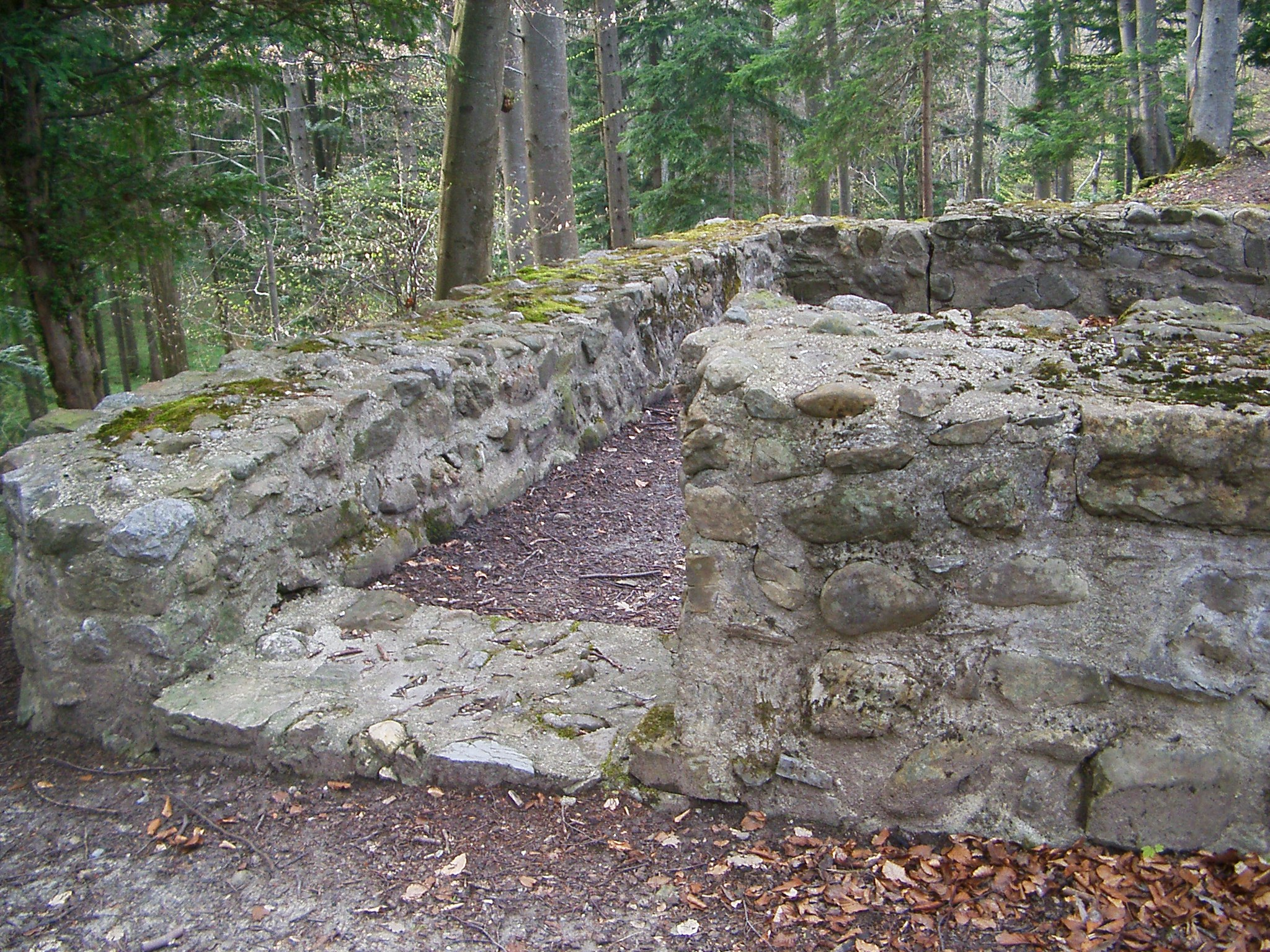 The castlel (ruins) of Kindhausen (Switzerland, Aargau, Bergdietikon).